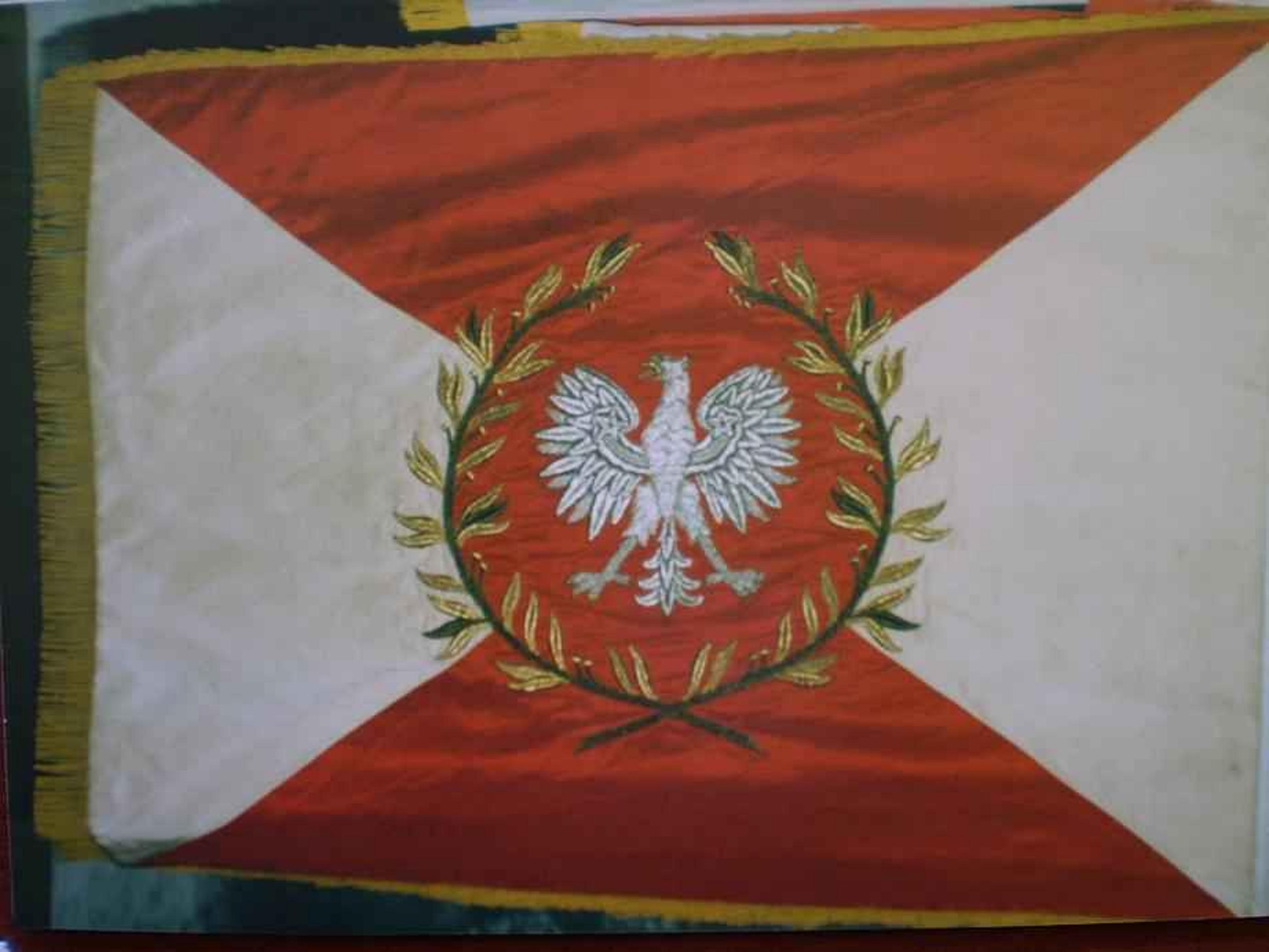 Sztandar 48 batalionu transportowego z Gubina